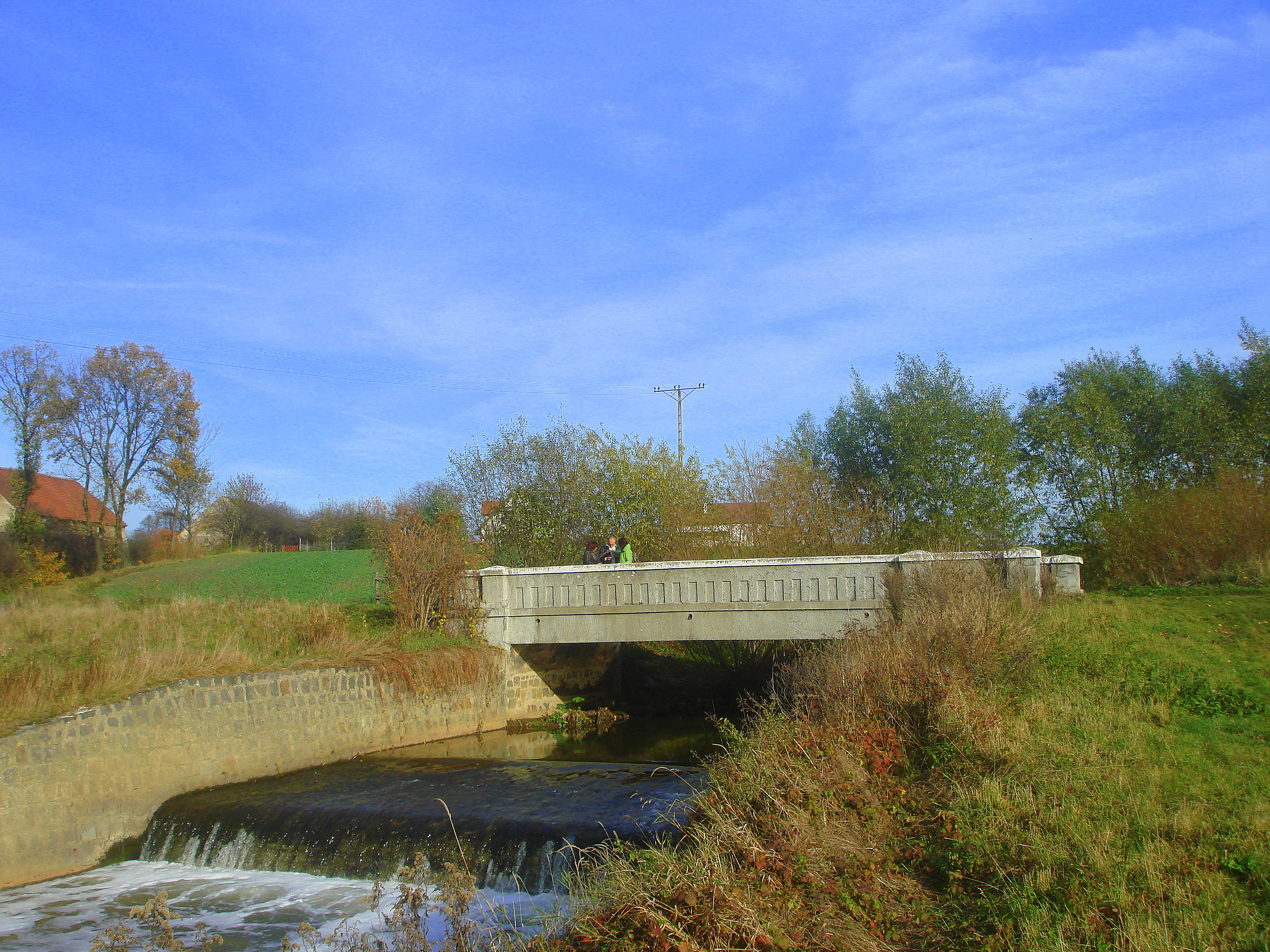 Pasieczna, most nad Pełcznicą